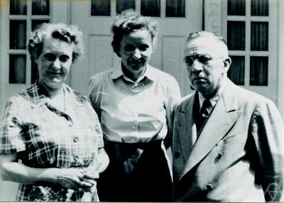 Foto di John Robert Kline (destra)